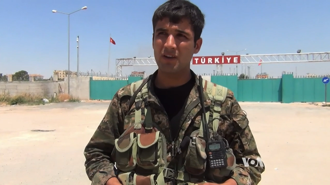 Officier des YPG à Tall Abyad devant le poste-frontière avec la Turquie, c. 24 juin 2015.